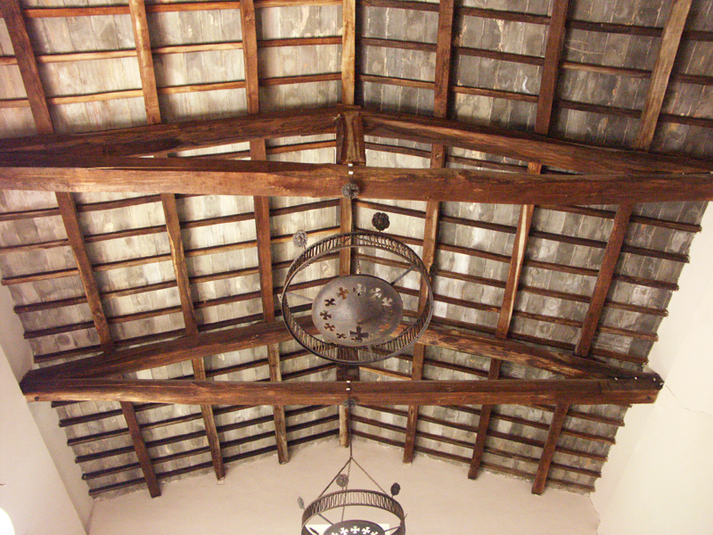 capriate